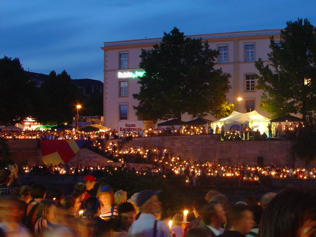 Abend der Begegnung auf dem 30.DEKT 2005 in Hannover - Lichtermeer beim Abschluss. Description